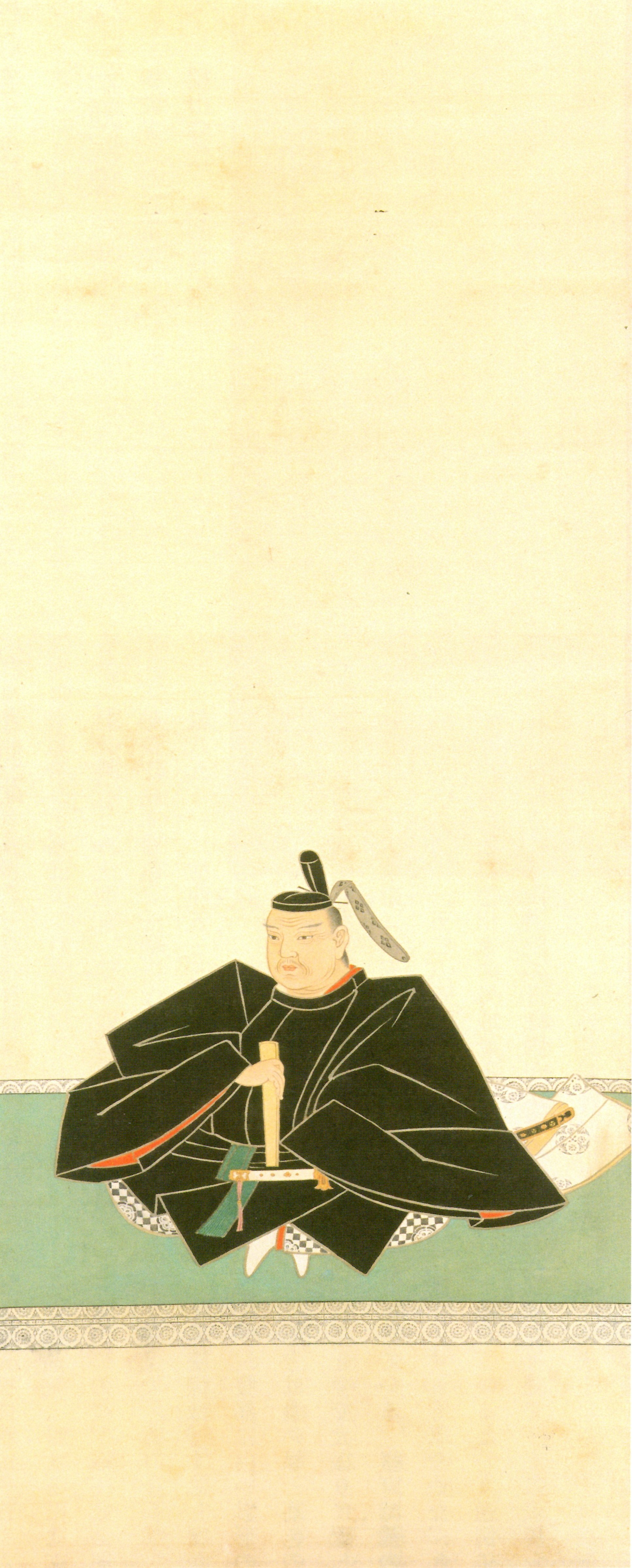 板倉重宗の肖像。